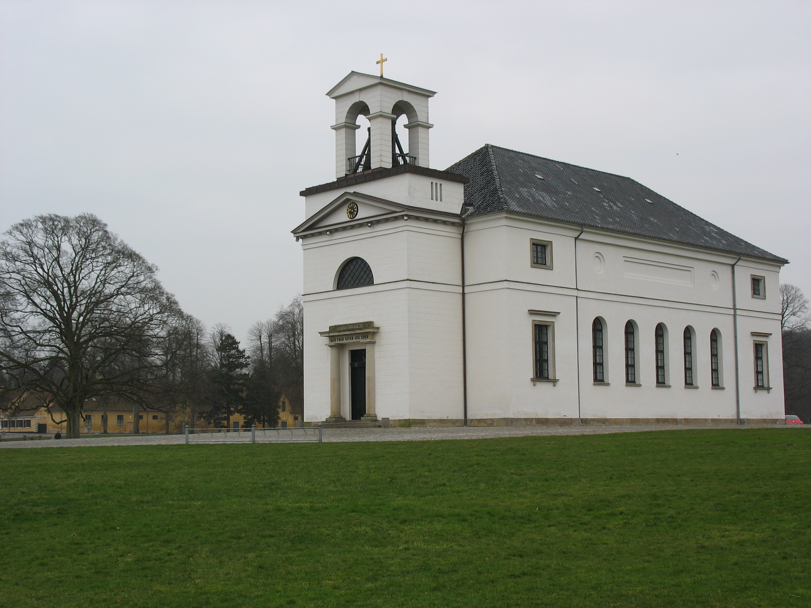 Hørsholm Kirke